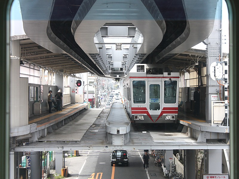 Croisement à la station Fujimicho